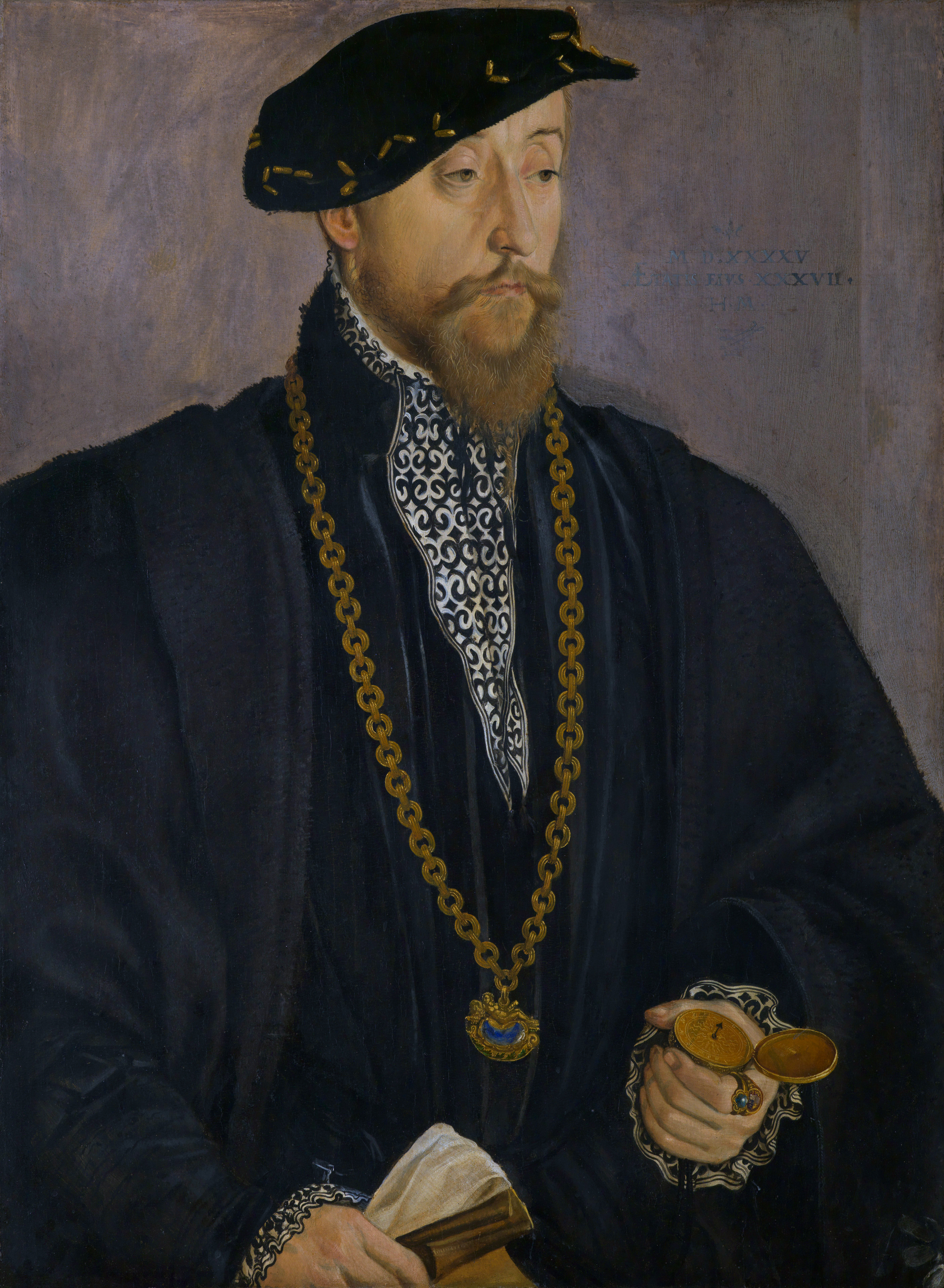 Bildnis des Pankraz von Freyberg zu Hohenaschau